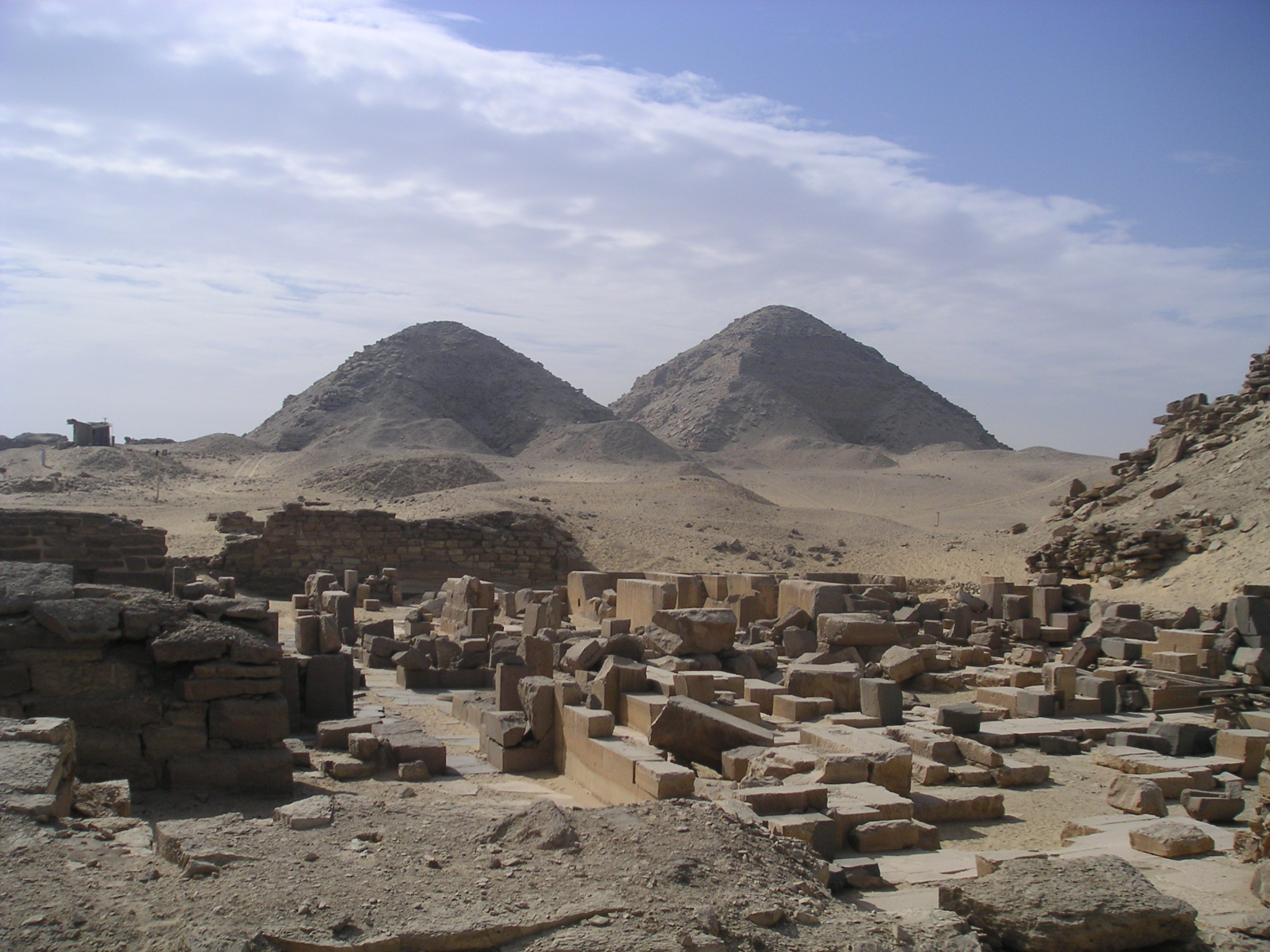 Abusir: Templo funerario de Sahura. Pirámides de Neferirkara-Kakai y Niuserra-Iny al fondo